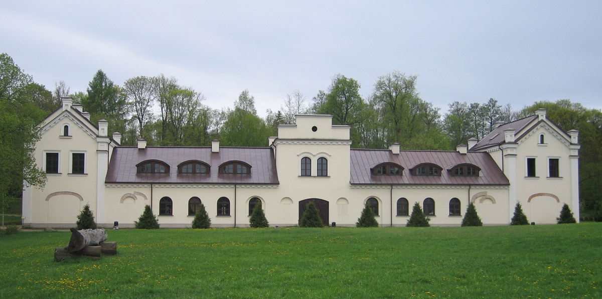 Vilniaus universiteto botanikos sodas. Arklidės